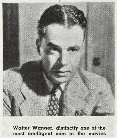 Film producer Walter Wanger, 1936